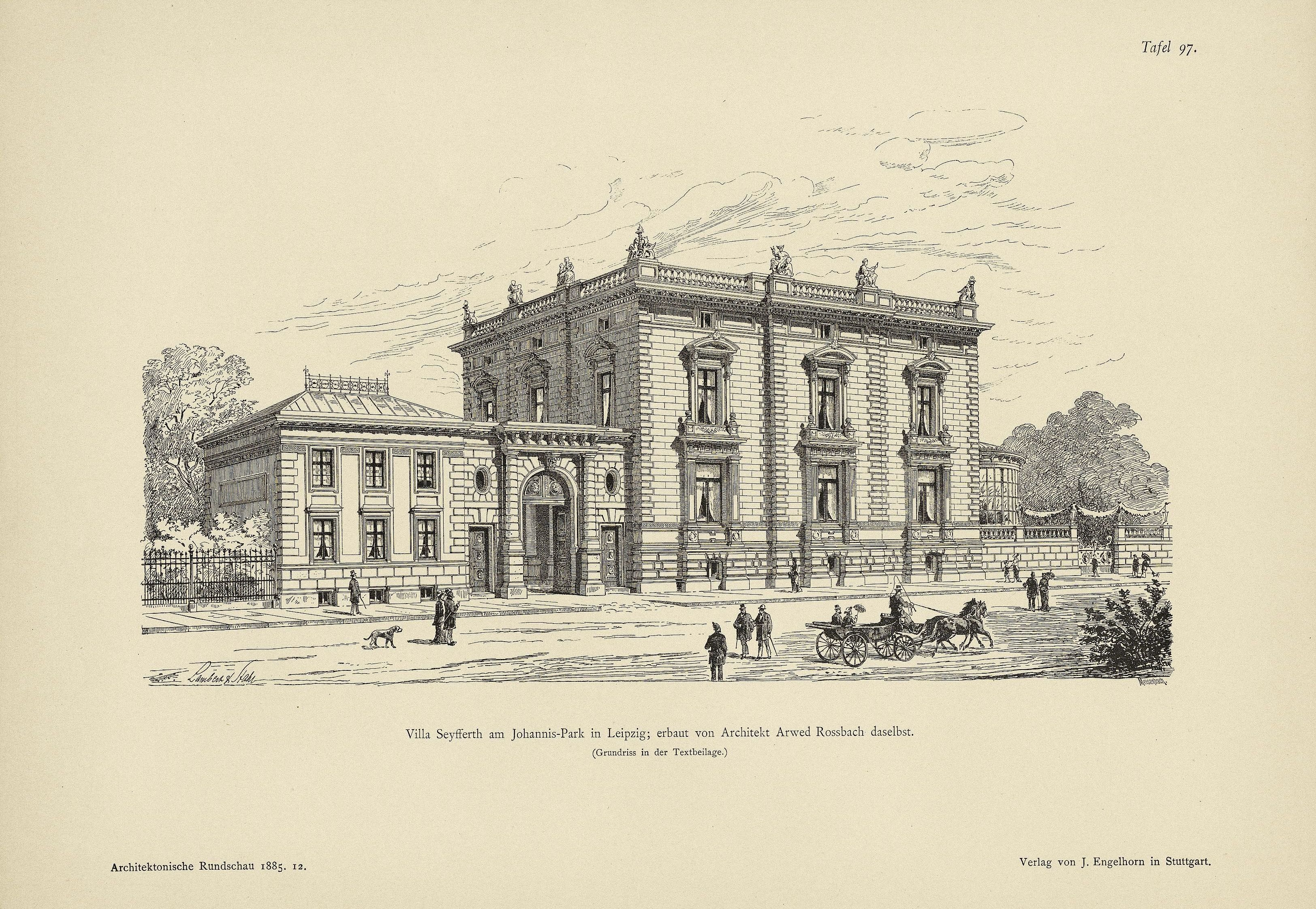 Villa von Wilhelm Seyfferth (Besitzer der Privatbank „Vetter & Co.“, Mitnitiator der Leipzig-Dresdner Eisenbahn) in der Leipziger Weststraße 5 (ursprünglich Weststraße 8; heute Friedrich-Ebert-Straße 5) - Ansicht von der Weststraße